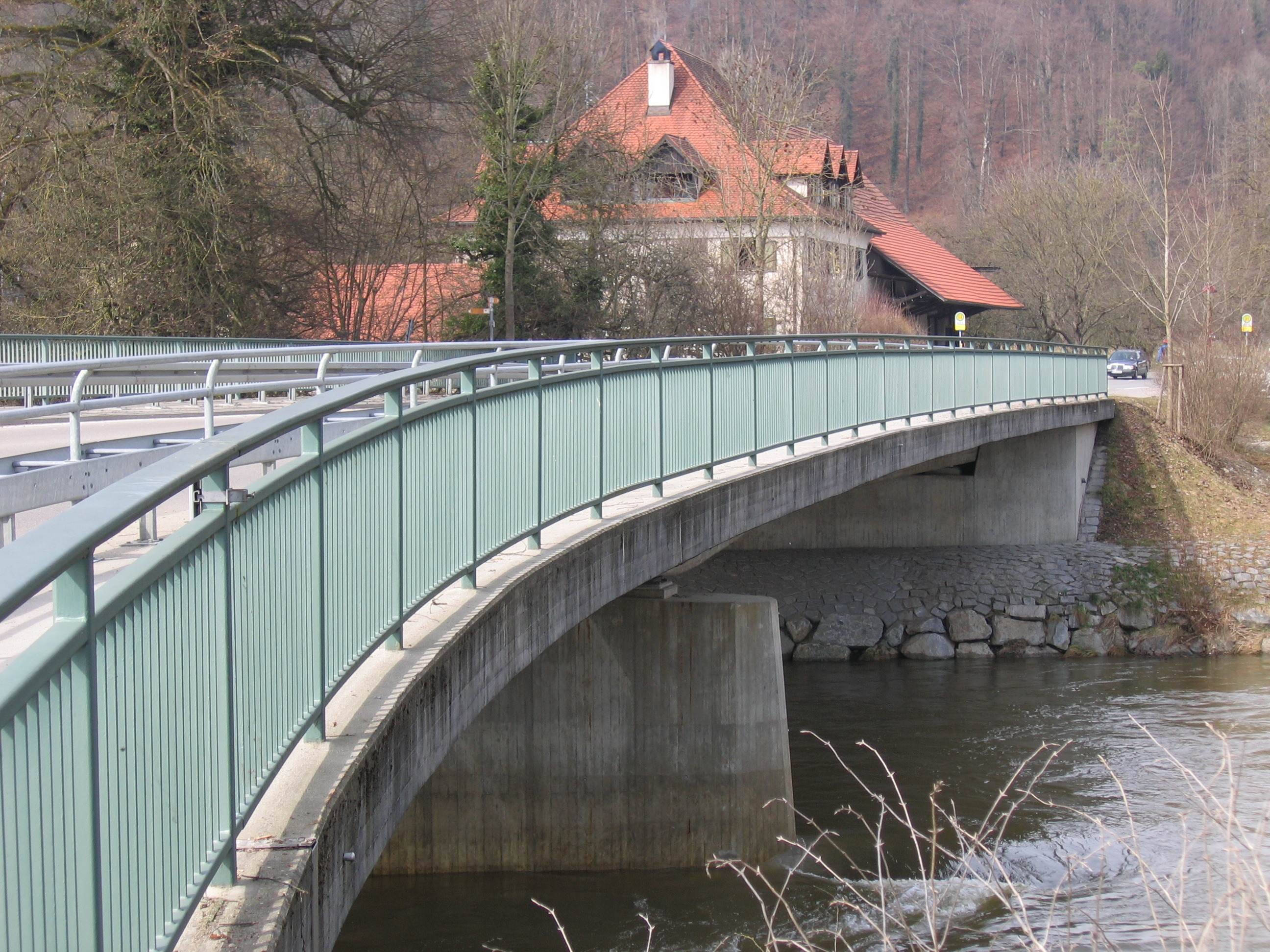 Deutschland - Baden-Württemberg - Bodenseekreis - Kressbronn - Ortsteil Gießemnrücke: die "Gießenbrücke", im Hintergrund das "Alte Zollhaus"